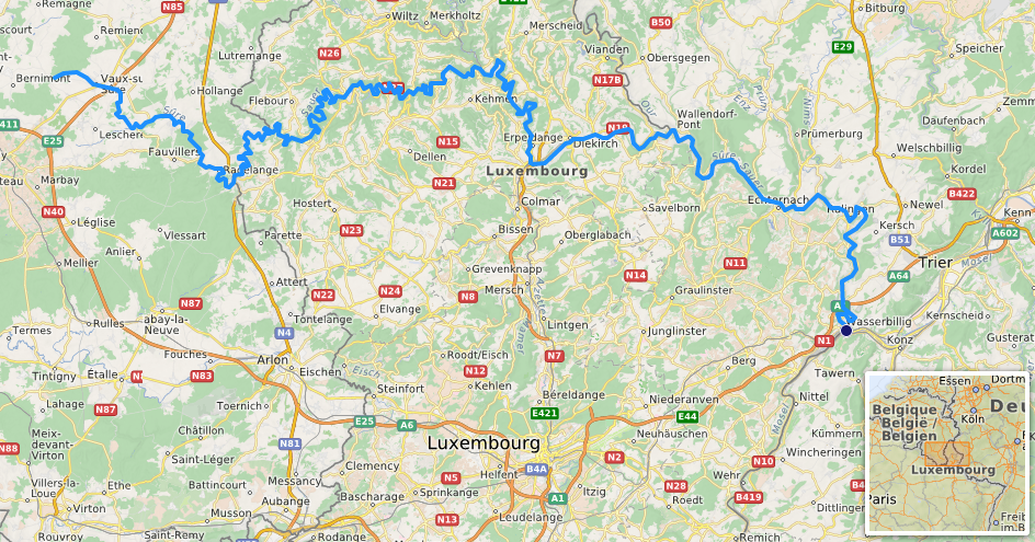 carte réalisée sur umap [1] This map may be incomplete, and may contain errors. Don't rely solely on it for navigation.